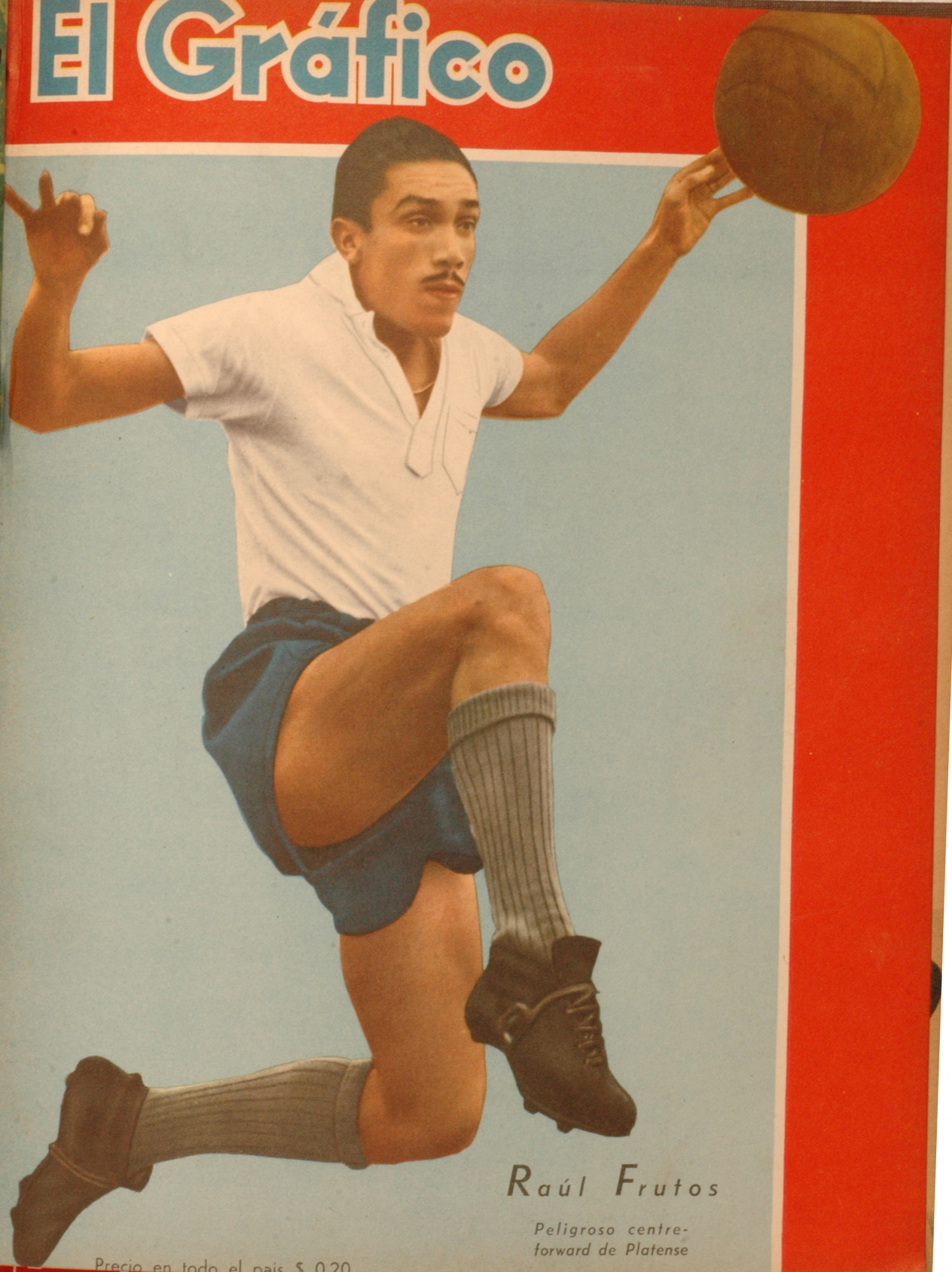 El Grafico del 04 de Junio de 1943. Edicion 1247